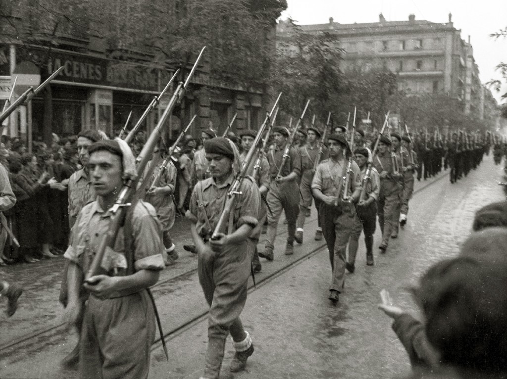 Título original: Tropas del bando nacional (14/16) Localización: San Sebastián (Guipúzcoa)